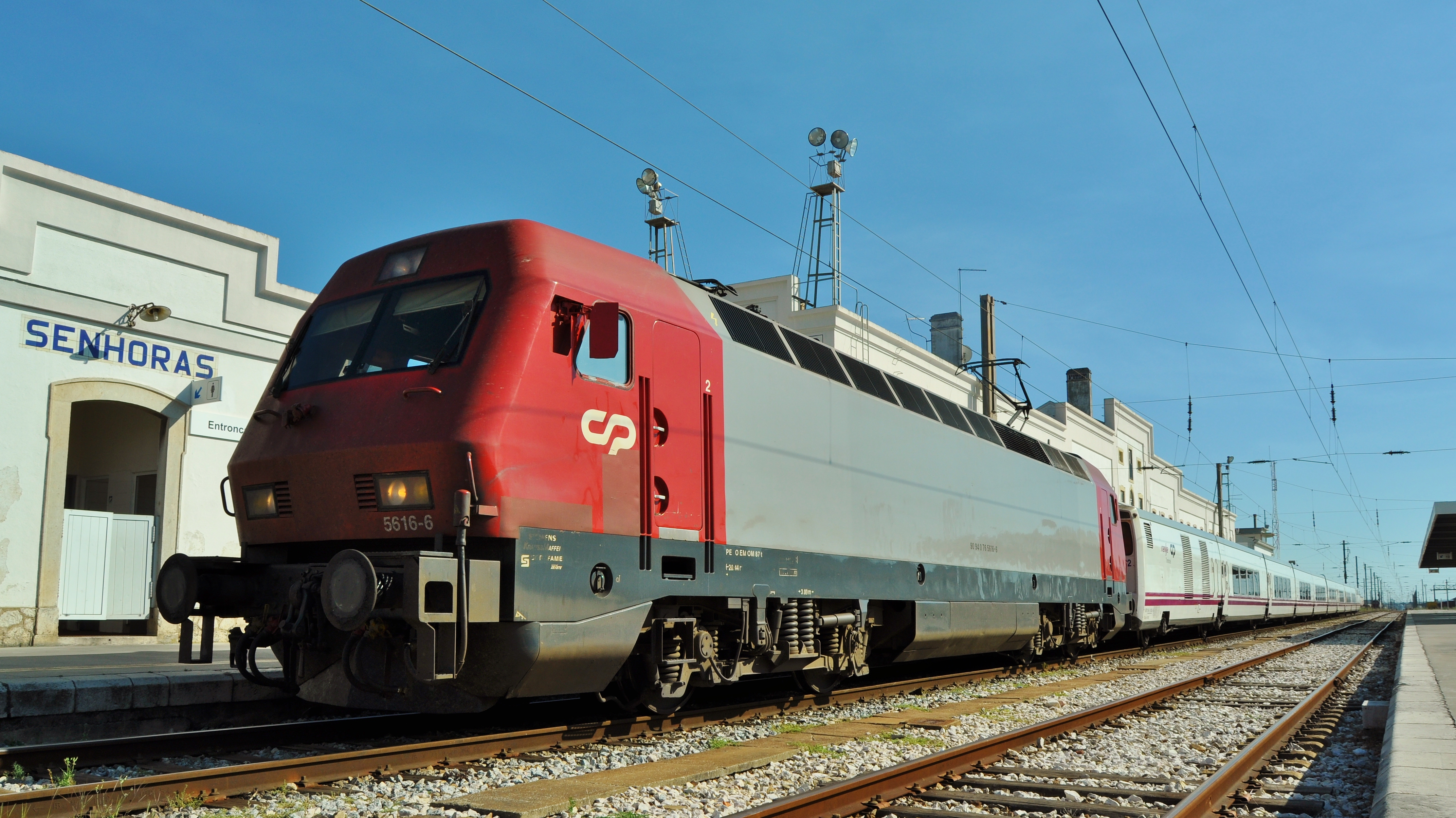 Material: CP 5600 Serviço: SudExpress Local: Entroncamento